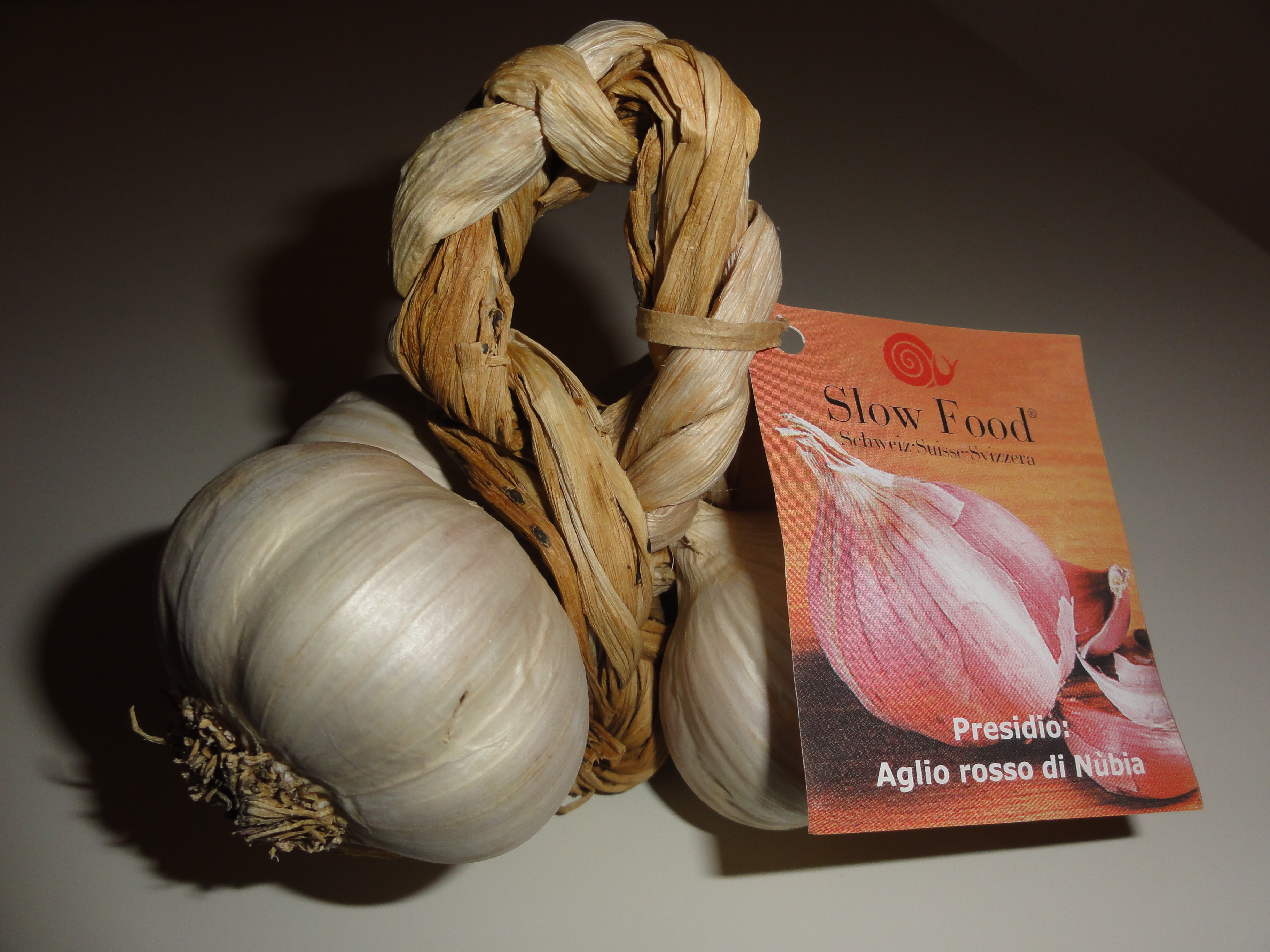 L'ail à la peau rouge tire son nom d'une part d'un petit faubourg de Paceco, dans la province de Trapani (Sicile) qui est le berceau historique de cette variété d'ail.